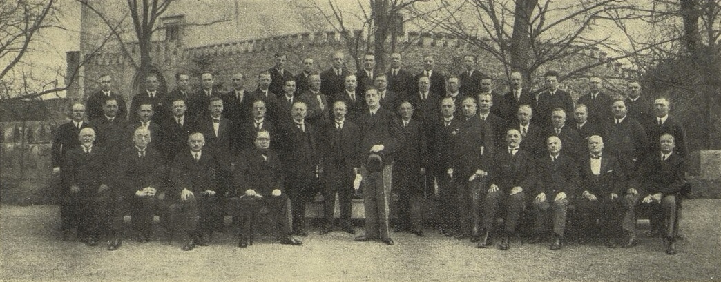 Schwarzenberští zaměstnanci s Karlem Schwarze Orlík